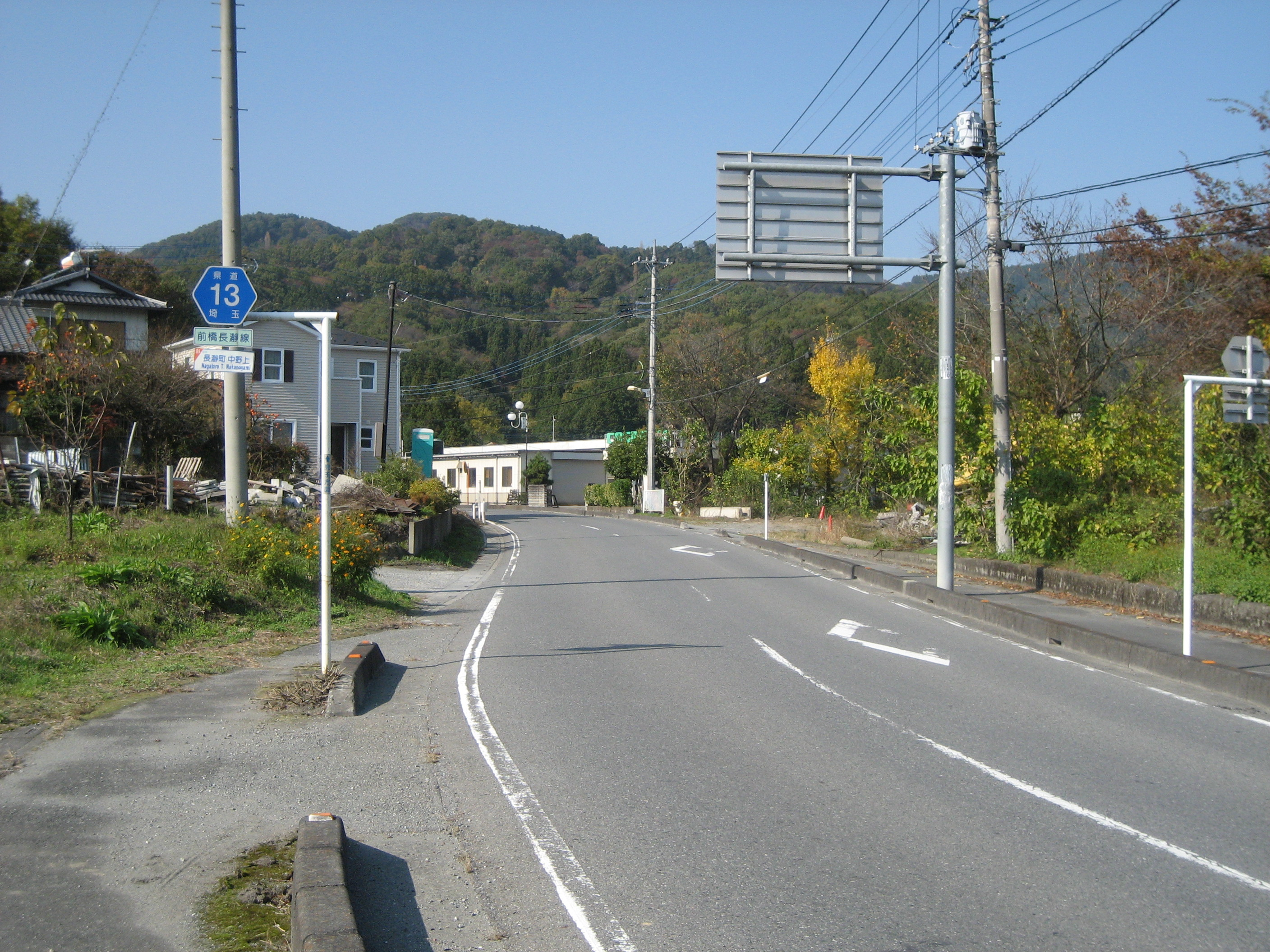 埼玉県道13号線長瀞町内